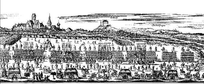 Truppenparade Schwäbischer Kreistruppen zwischen Ulm und Wiblingen 1683